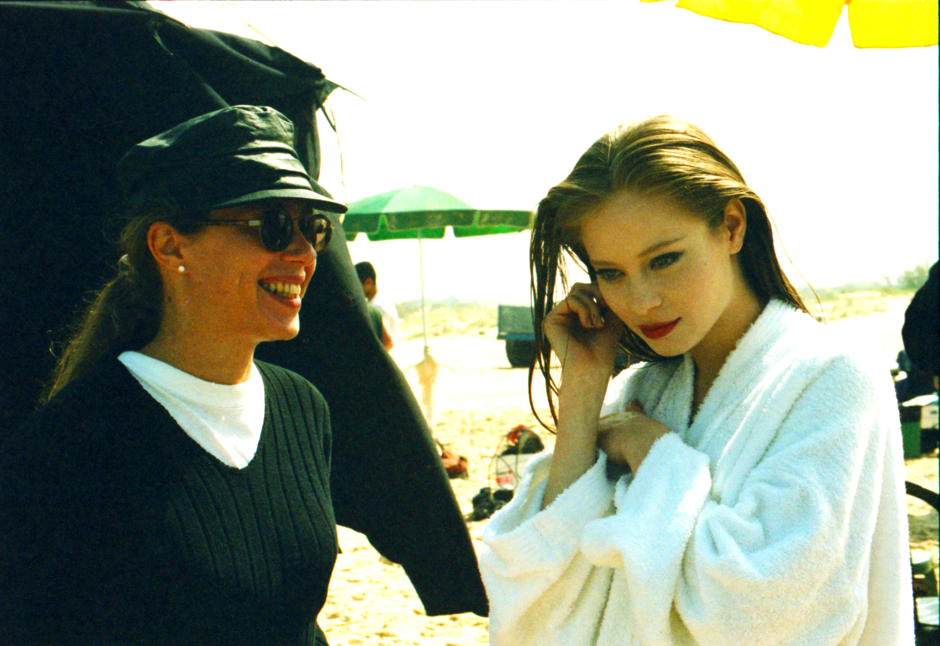 הבמאית נירית ירון והדוגמנית נינה ברוש (ויק)